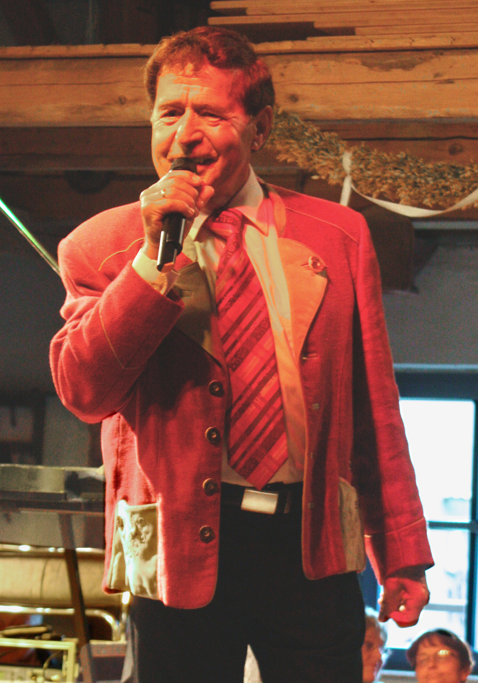 Eberhard Hertel bei einem Auftritt